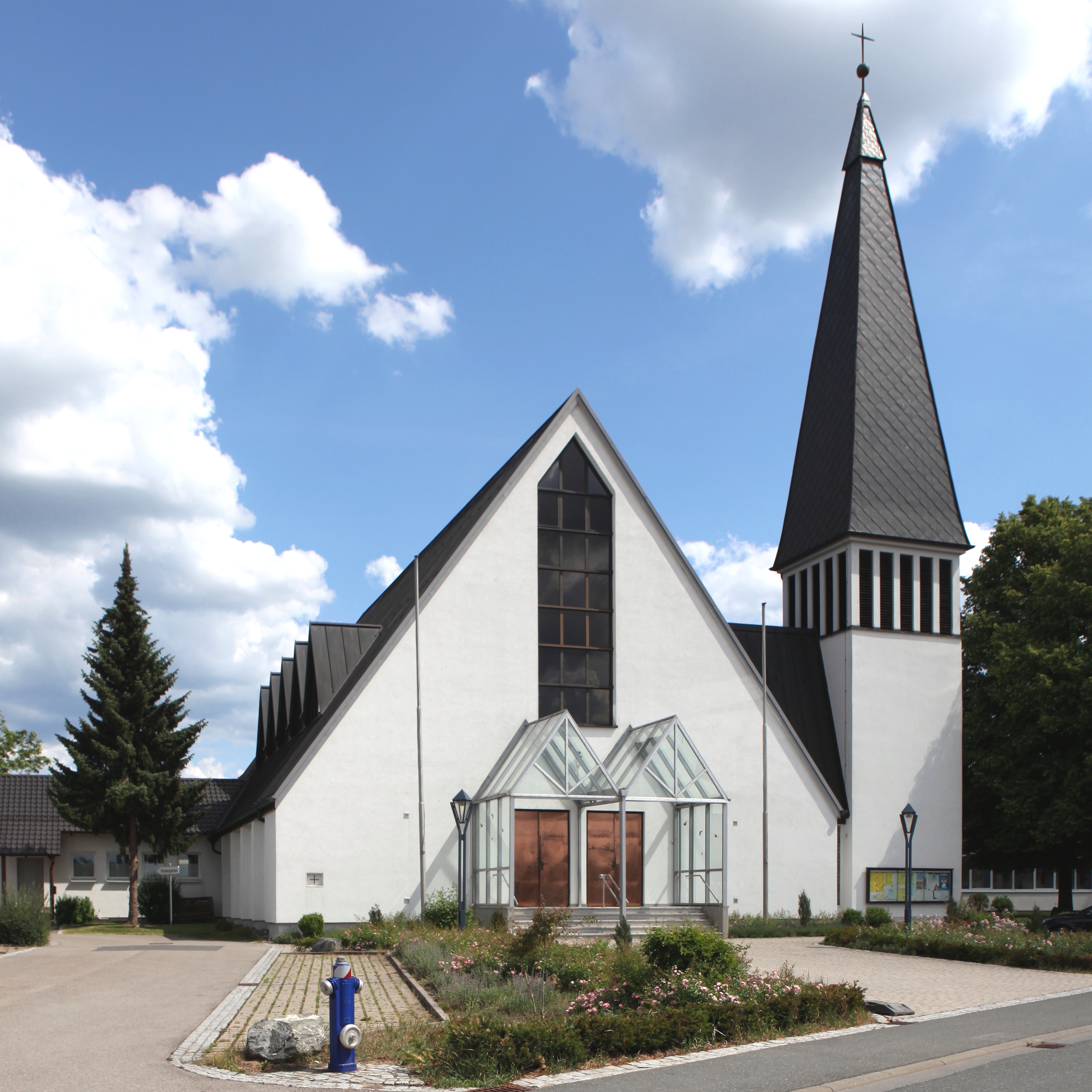 Kath. Kirche St. Marien, Coburg Spittelleite 40